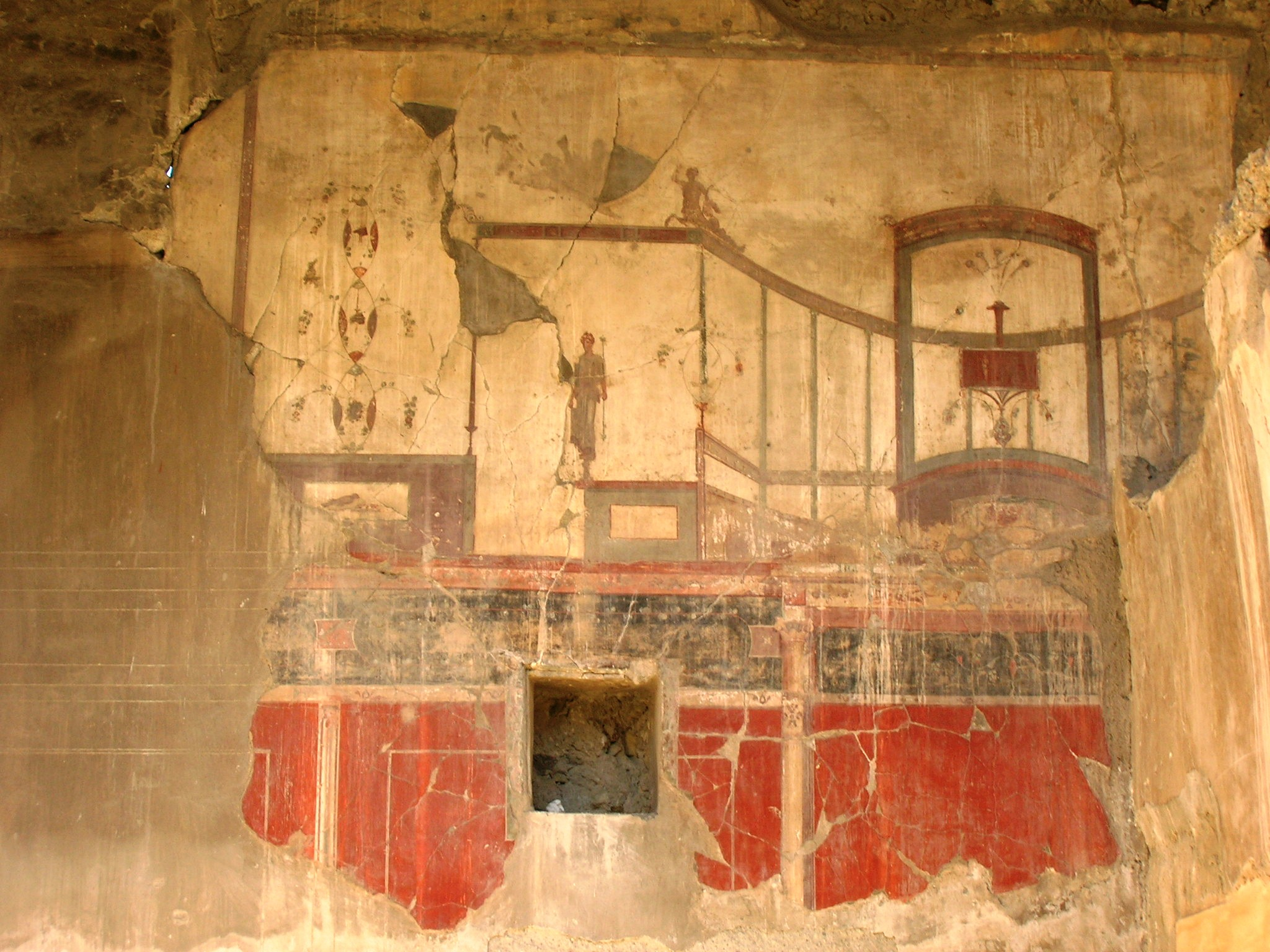 Taverna di Priapo